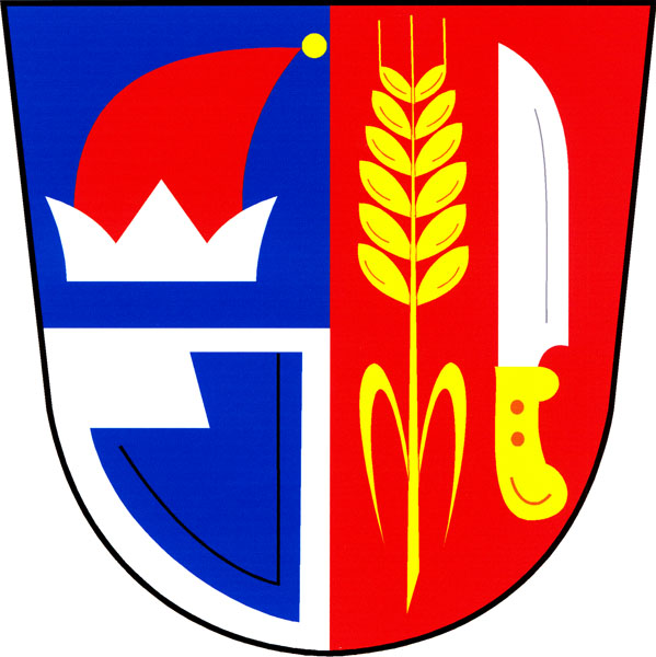 Znak obce Počenice-Tetětice